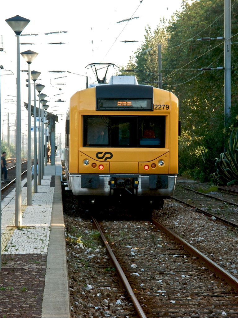 Tipo: Comboio Urbano 15980 [Porto • Campanhã - Granja] Local: Estação da Granja [Linha do Norte, PK 320] Data e hora: 15 de Outubro de 2008 [17h54] Material: Automotora 2279 [Unidade Tripla Eléctrica]